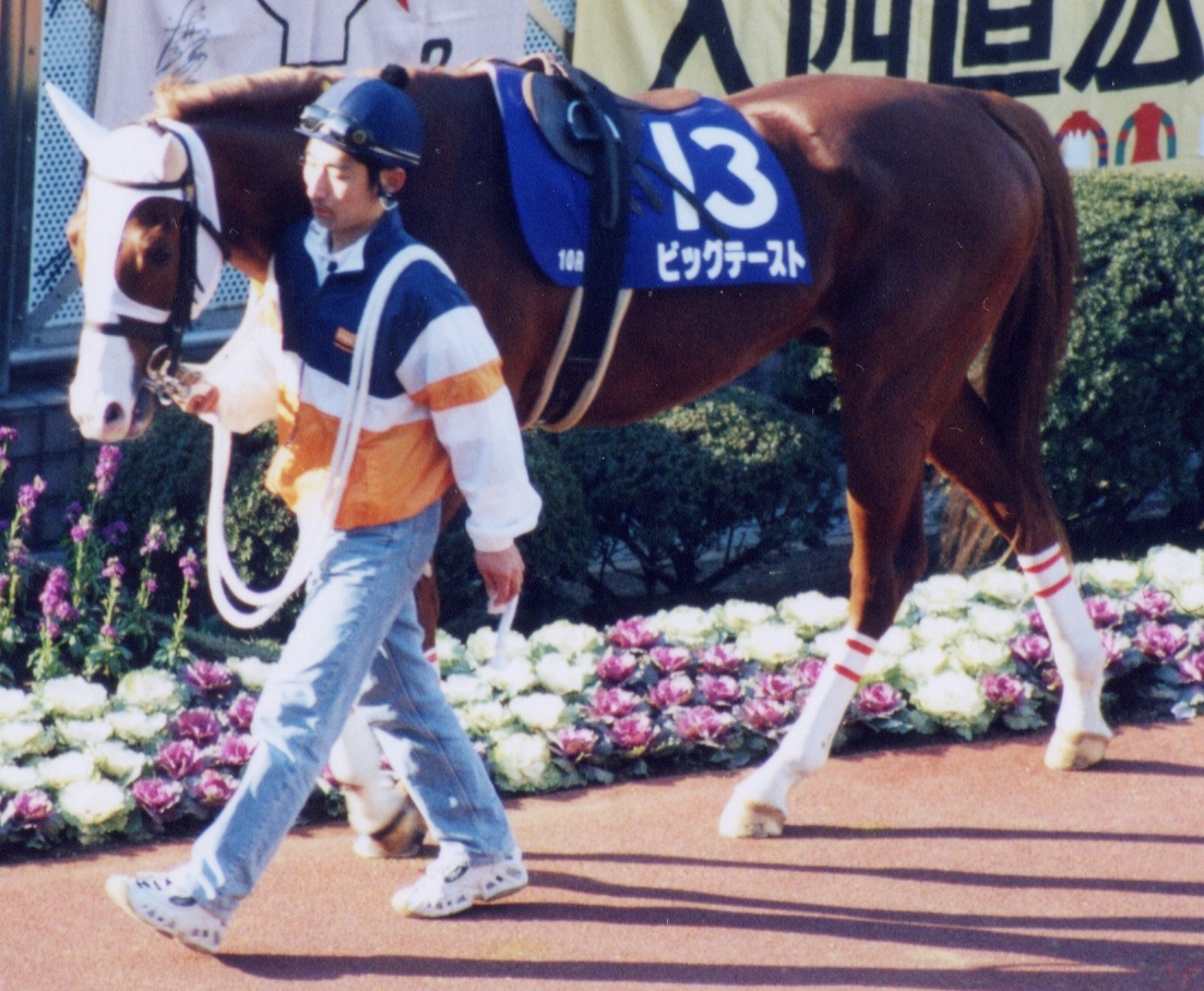 Big Taste (horse)